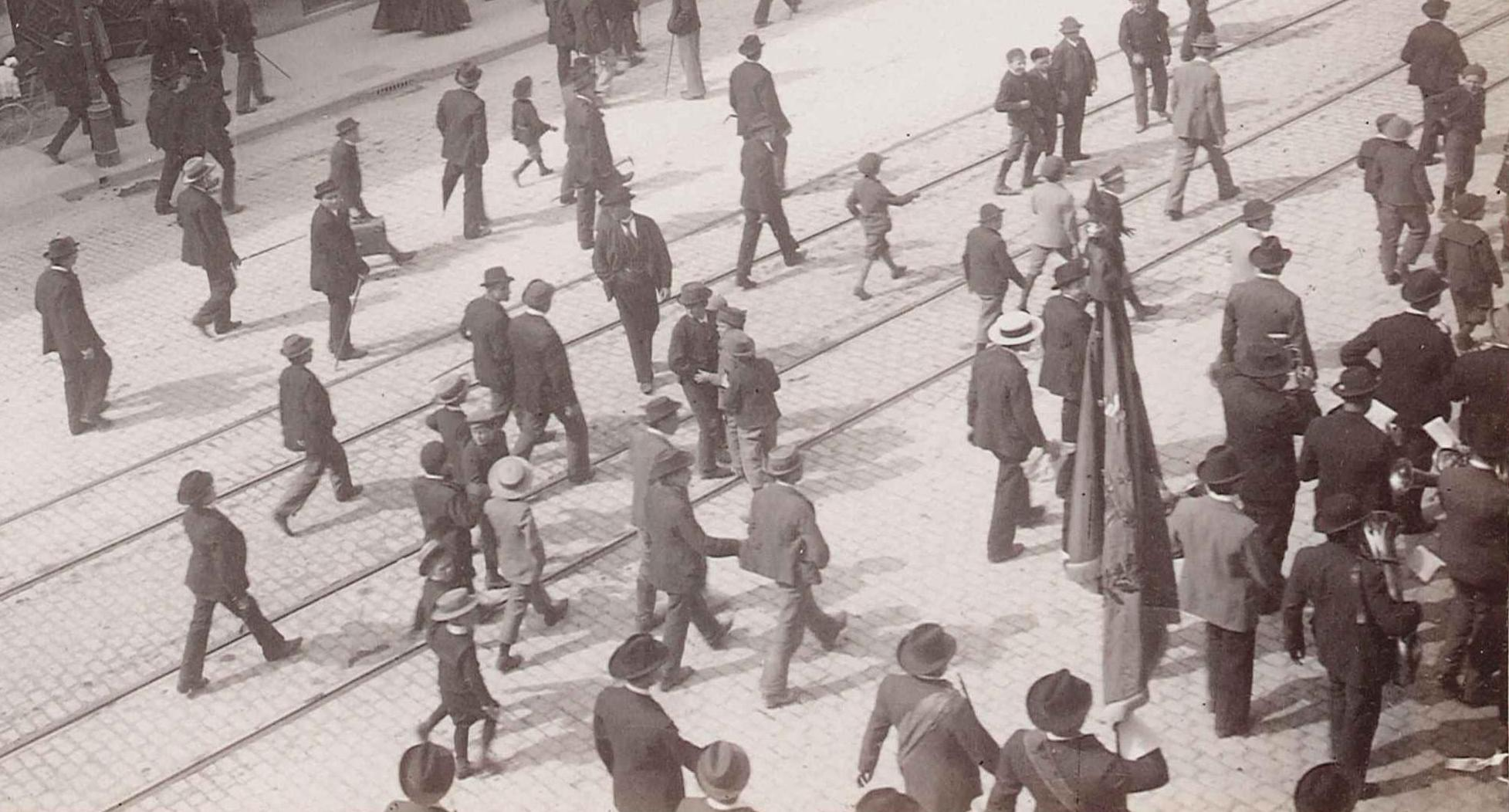 Arbeiterzug in der Neckarstraße in Stuttgart am 1. Mai 1900, fotografiert um 14:30 Uhr vom Gebäude Neckarstraße 34 aus. Ein Arbeiter trägt die rote Fahne.